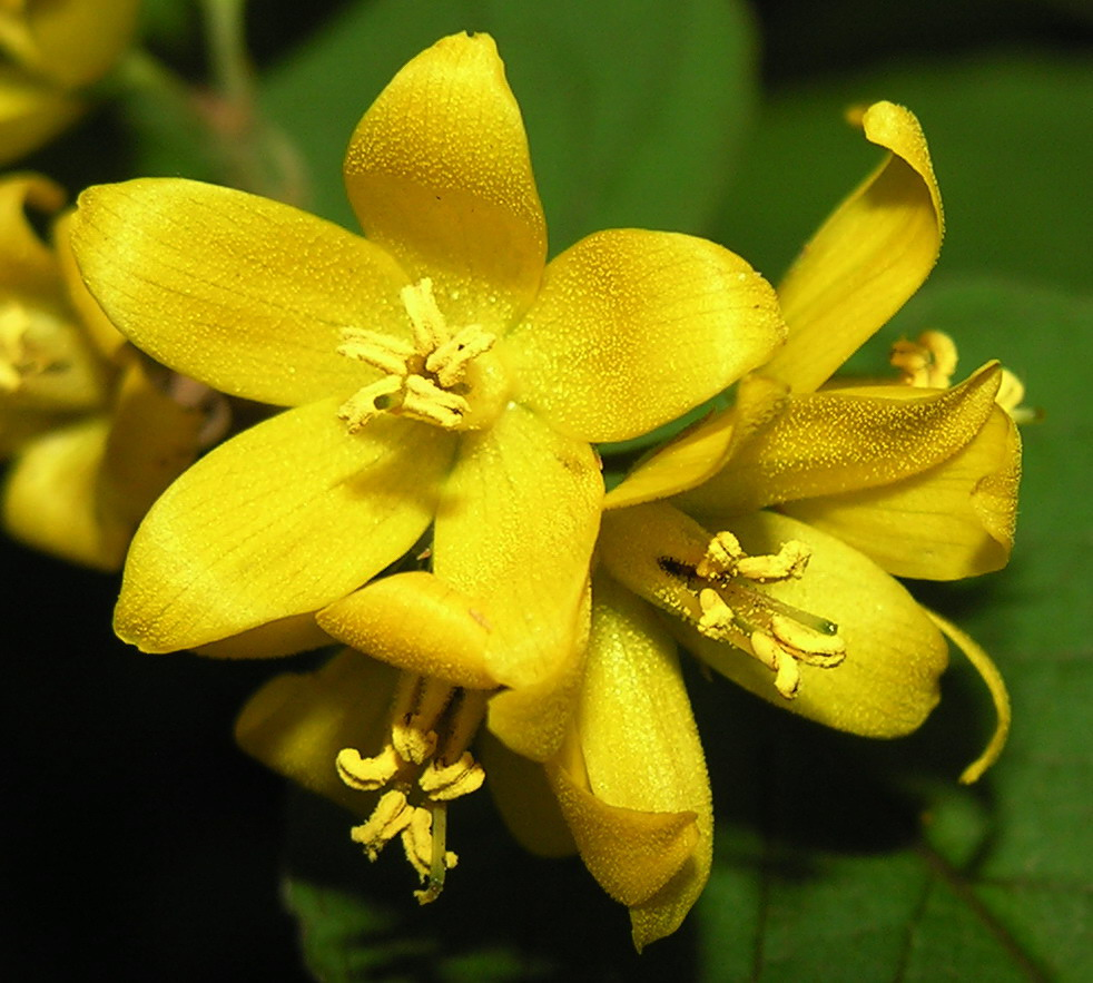 Paprastoji šilingė (Lysimachia vulgaris), žiedai Šeima. Mirsininiai (Myrsinaceae) Foto: Algirdas, 2006 m. liepos 29 d., Lietuva